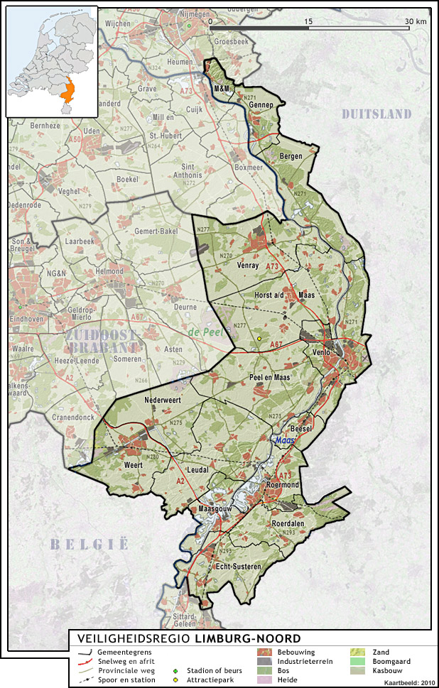 Veiligheidsregio Limburg-Noord, met indeling van gemeenten (2010) en impressie van het landschap. Door Jan-Willem van Aalst, samengesteld uit publiek beschikbare geo-data: Referentie-ondergrond (kustlijn, steden, wegen) gerasterd uit de OpenStreet Map OSM. ( Inhoud is beschikbaar onder de Creative Commons Attribution-ShareAlike 3.0 license. Referentie-ondergrond op water bewerkt vanuit Gebruik is vrij met bronvermelding NLR en ESA. Vectorgrenzen van gemeenten en regio's vrij ter beschikking gesteld met dank aan cartografen van brandweerregio's Hollands-Midden en IJsselland; gerasterd in Photoshop. Hoogte-aanduidingen (reliëf) gerasterd uit de AHN Viewer ( gebruik is vrij met bronvermelding (c) AHN, Overige kenmerken op de kaart: eigen tekenwerk van Jan-Willem van Aalst, op basis van gerasterde gemeentegrenzen.